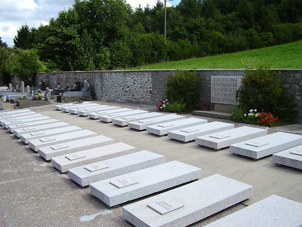 Tombes des 27 victimes du massacre du 26 juin 1944 à Dun-les-Places